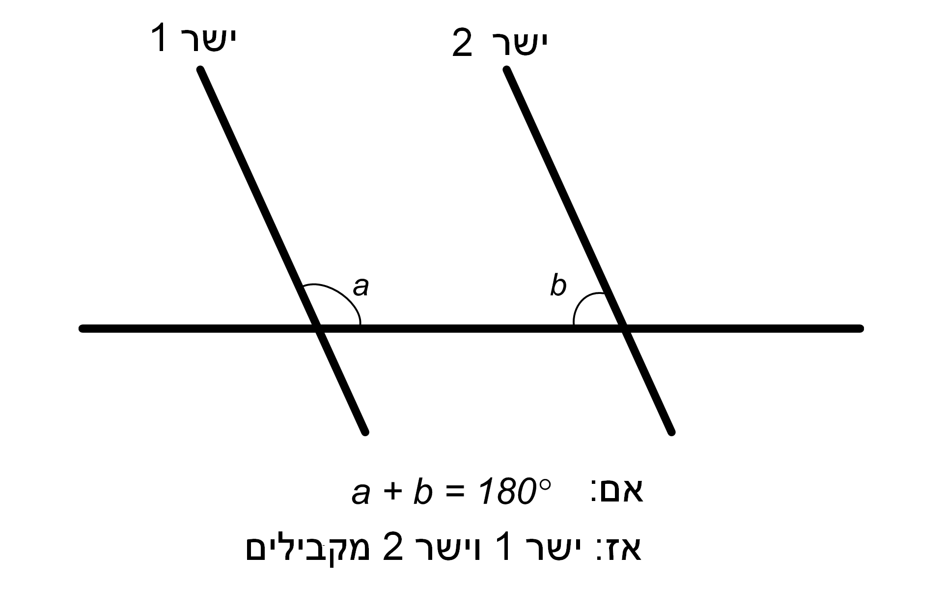 משפט שקול לאקסיומת המקבילים